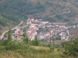 A panorama of Şenpazar in Kastamonu, Turkey. (şahsi çekilen resim)